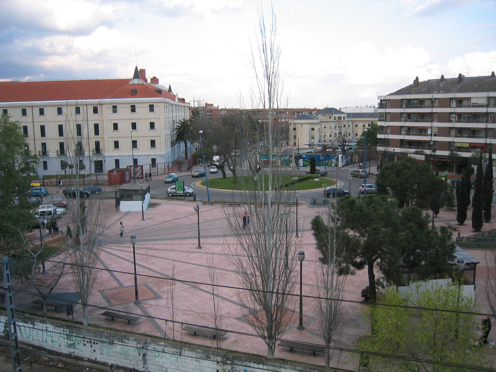 Edificio de la izquierda: Escuela Politécnica Superior de la Universidad Carlos III de Madrid (Leganés). A la izquierda: Parque del 700º Aniversario.